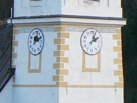 Kostel svatého Mikuláše (Hanušovice), detail renesanční věže